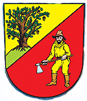 znak obce Podolí